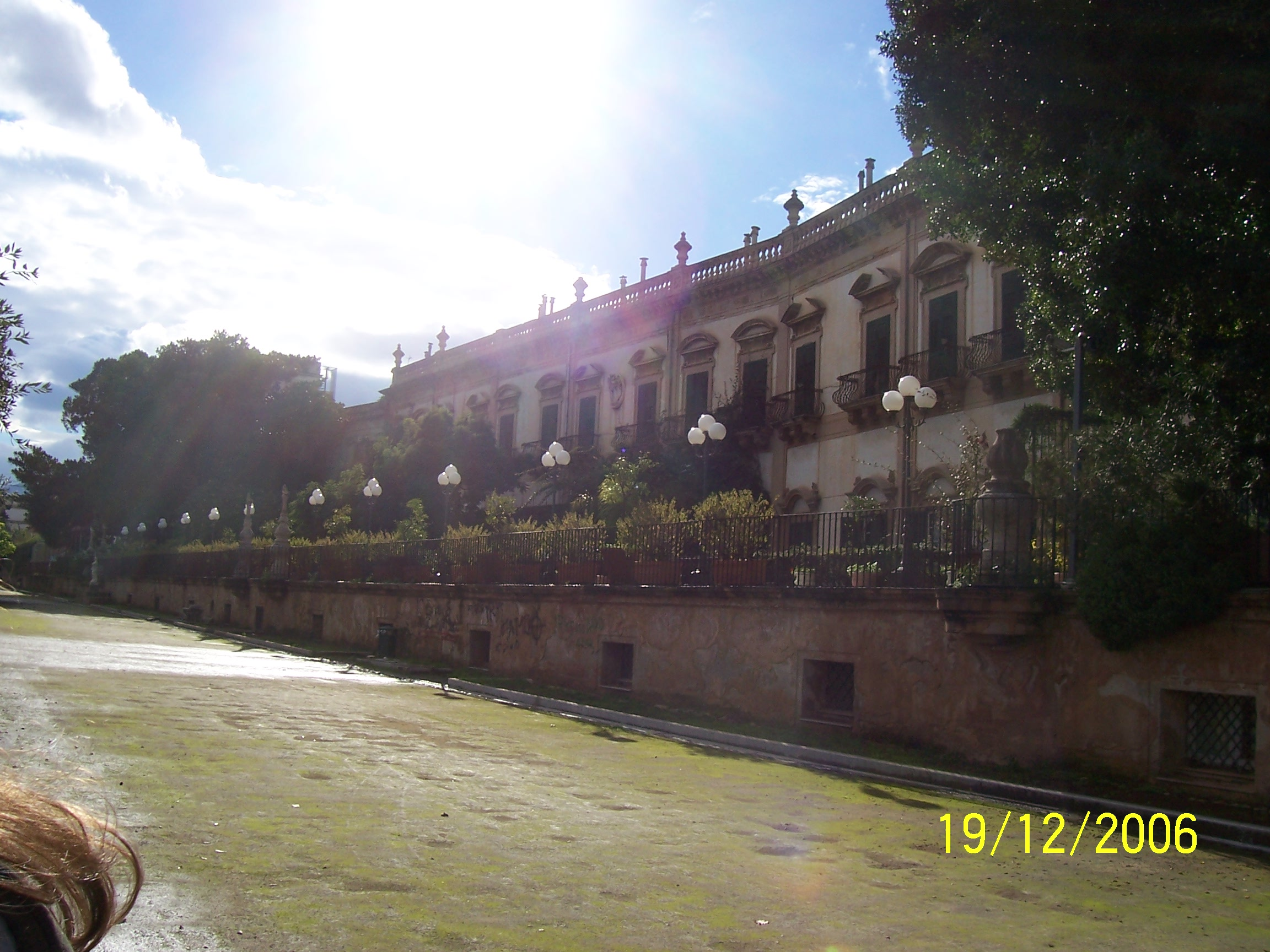 passeggiata sulle mura delle Cattive, Palermo, Sicilia